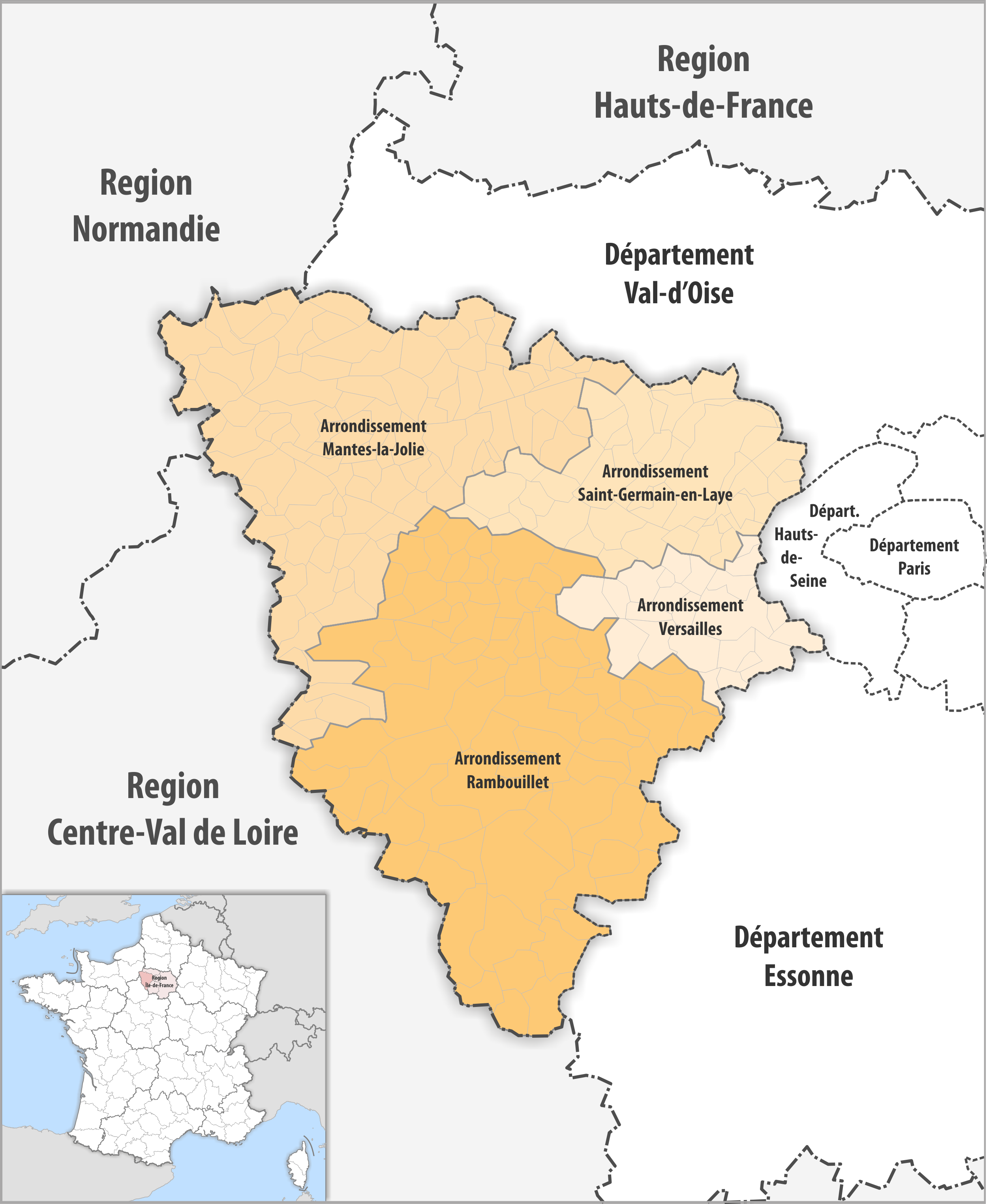 Gemeinden und Arrondissemente im Departement Yvelines